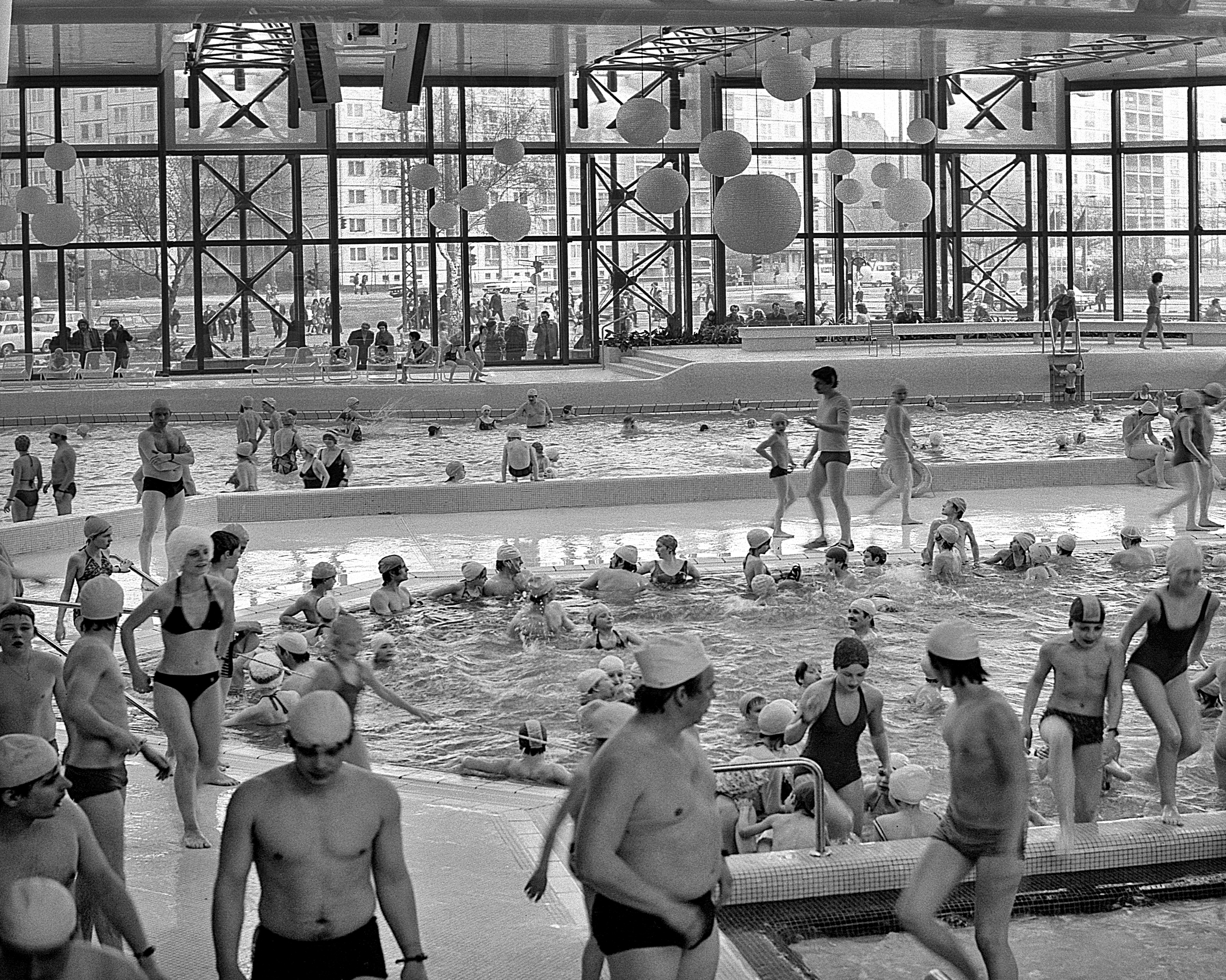 Sport und Erholungszentrum (SEZ) Badegäste mit Badekappe